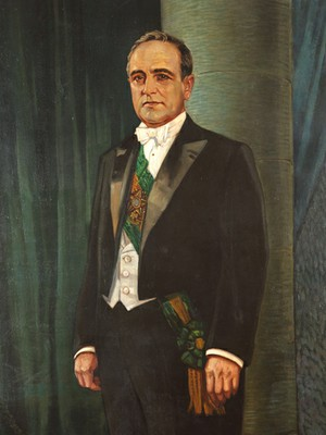 Pintura de Getúlio Vargas da Presidência da República Federativa do Brasil.